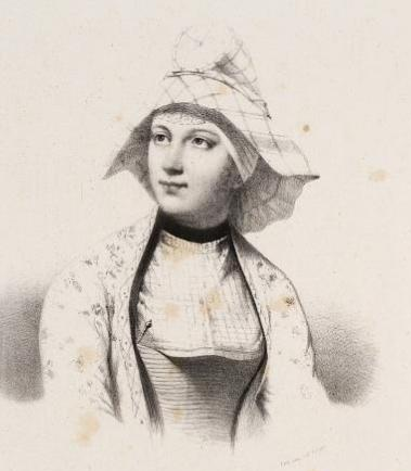 Lithografie met een afbeelding van een vrouw in Hindelooper dracht omstreeks 1840. Aan het model van de hoofdtooi, met een tonvormig hoedje onder de hoofddoek, is te zien dat deze vrouw getrouwd is. Dat zou ook te zien zijn aan de plaats waar zij haar rijgnaald draagt. Met de rijgnaald met veter werd het rijglijf, een soort korset, dichtgeregen en vervolgens werd de rijgnaald in het korset gestoken. Volgens de overlevering droegen ongetrouwde vrouwen hun rijgnaald links ingestoken.